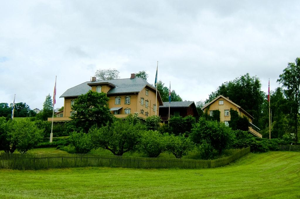 Main house of Aulestad. Home of Bjørnstjerne Bjørnson